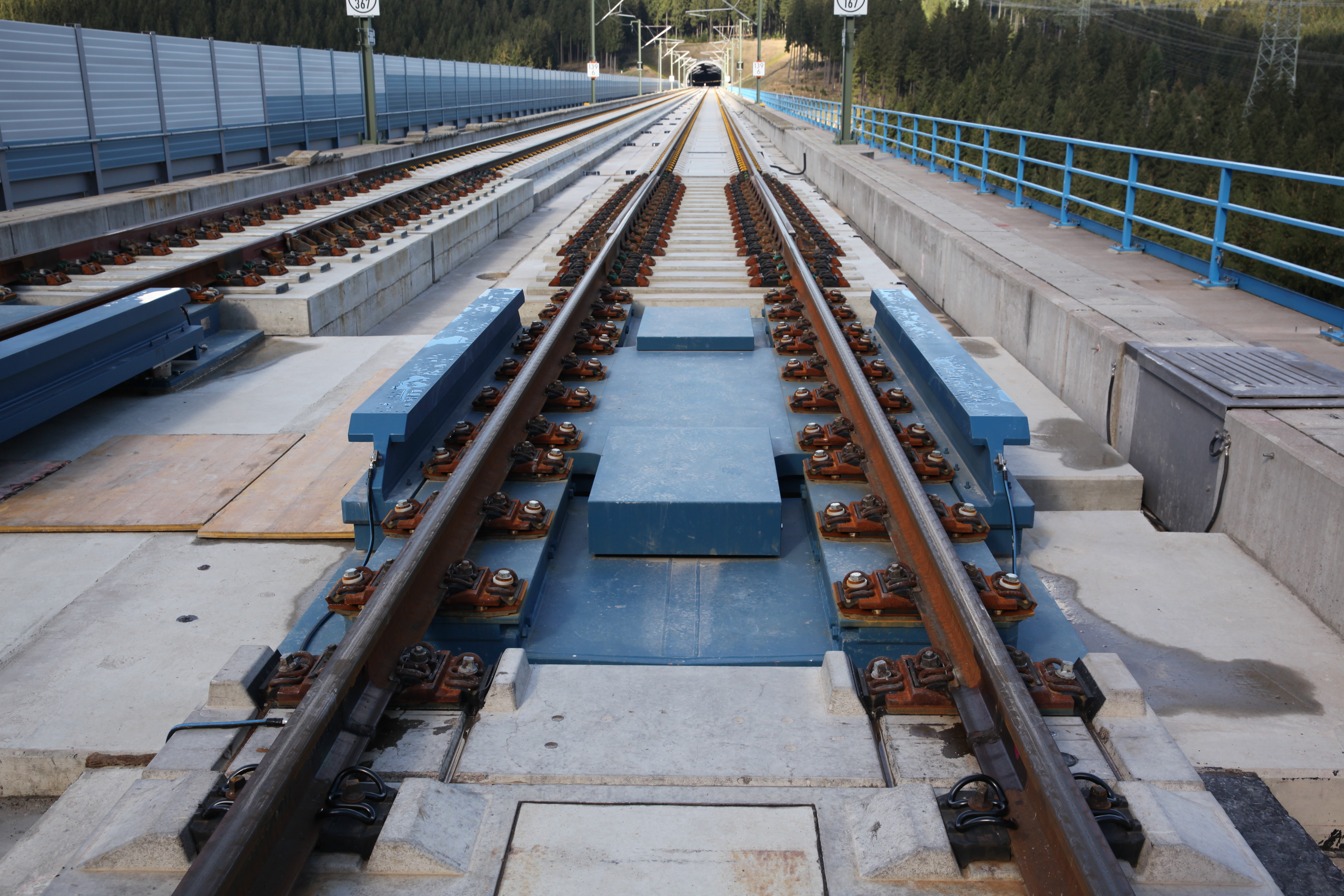 Ausgleichsplatte und Schienenauszug auf der Oelzetalbrücke, NBS Ebensfeld–Erfurt